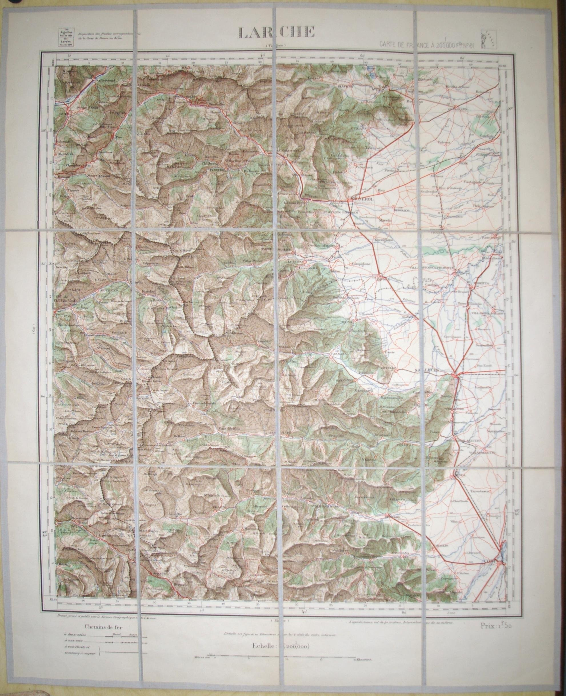 Réduction d'une carte d'État-Major en couleur